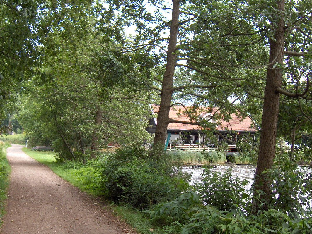 Sassenhein